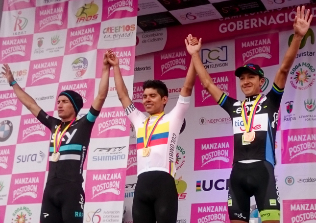 Elites Hombres Campeonatos Nacionales de Ruta Boyacá 2016